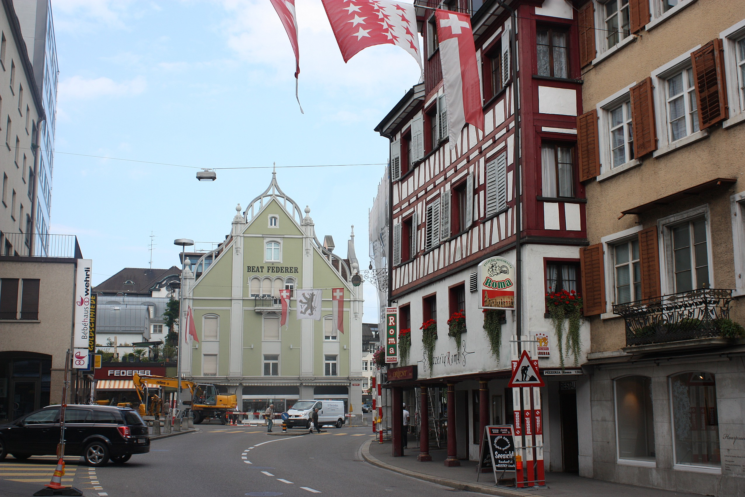 Die Hauptstraße, Blick nach Westen